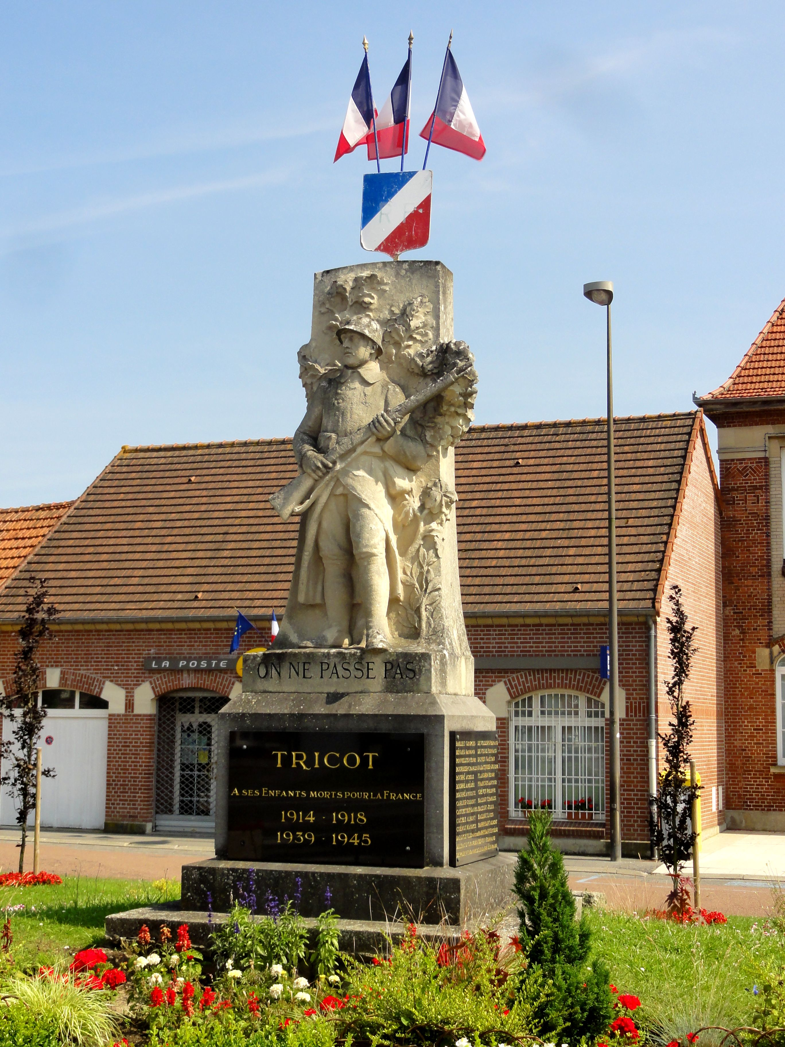 Le monument aux morts, Grande-rue, devant la mairie.